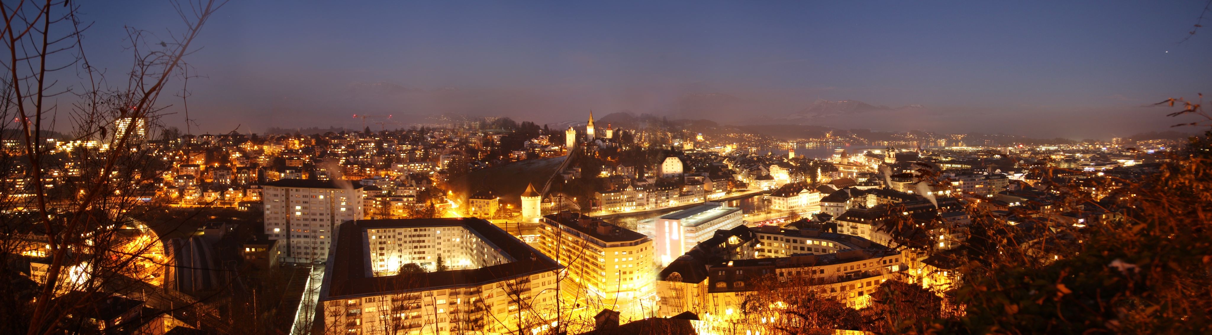 Panorama vom Chauteau Gütsch